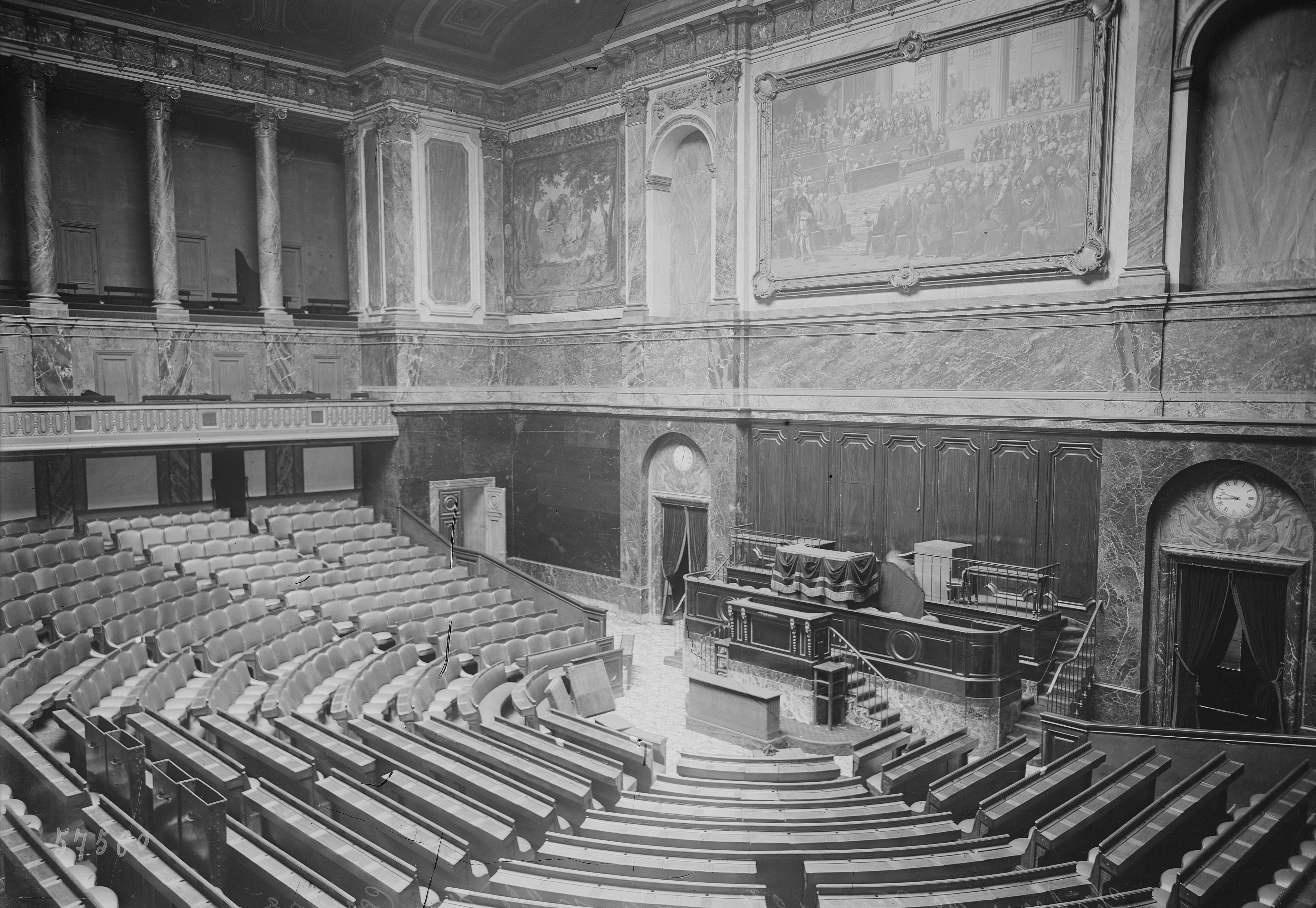 Château de Versailles, la salle du Congrès (préparatifs de l'élection présidentielle de janvier 1920)